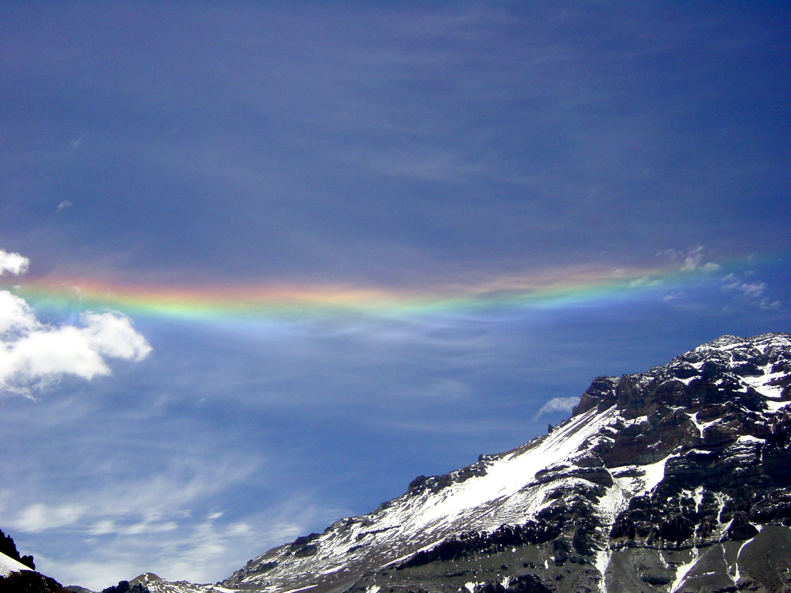 circumhorizontal arc